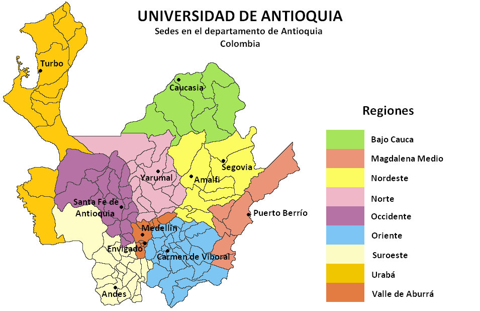 Mapa de las sedes de la Universidad de Antioquia en el Departamento de Antioquia. Colombia.